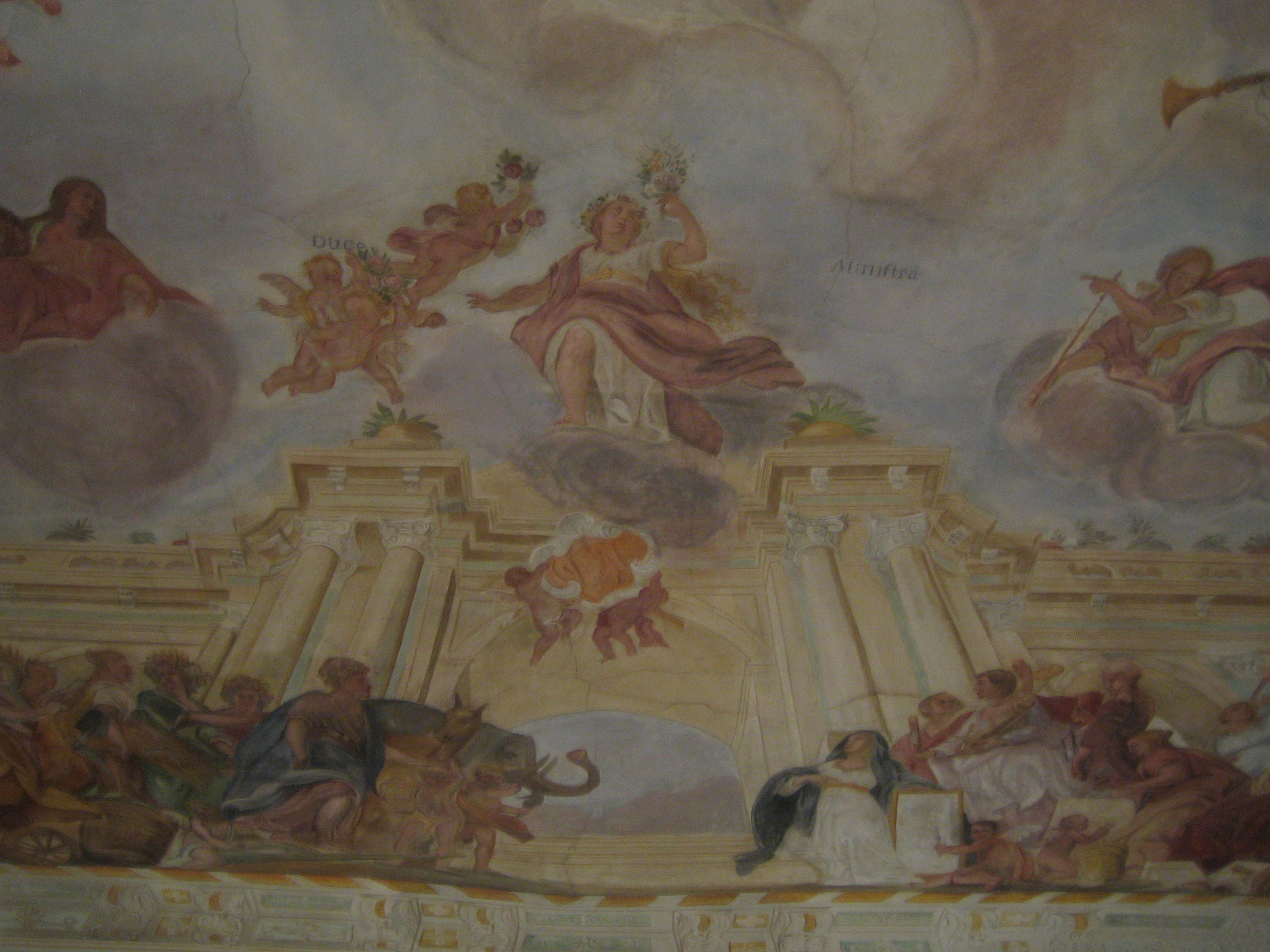 Deckenfresko der Alten Antatomie Ingolstadt.